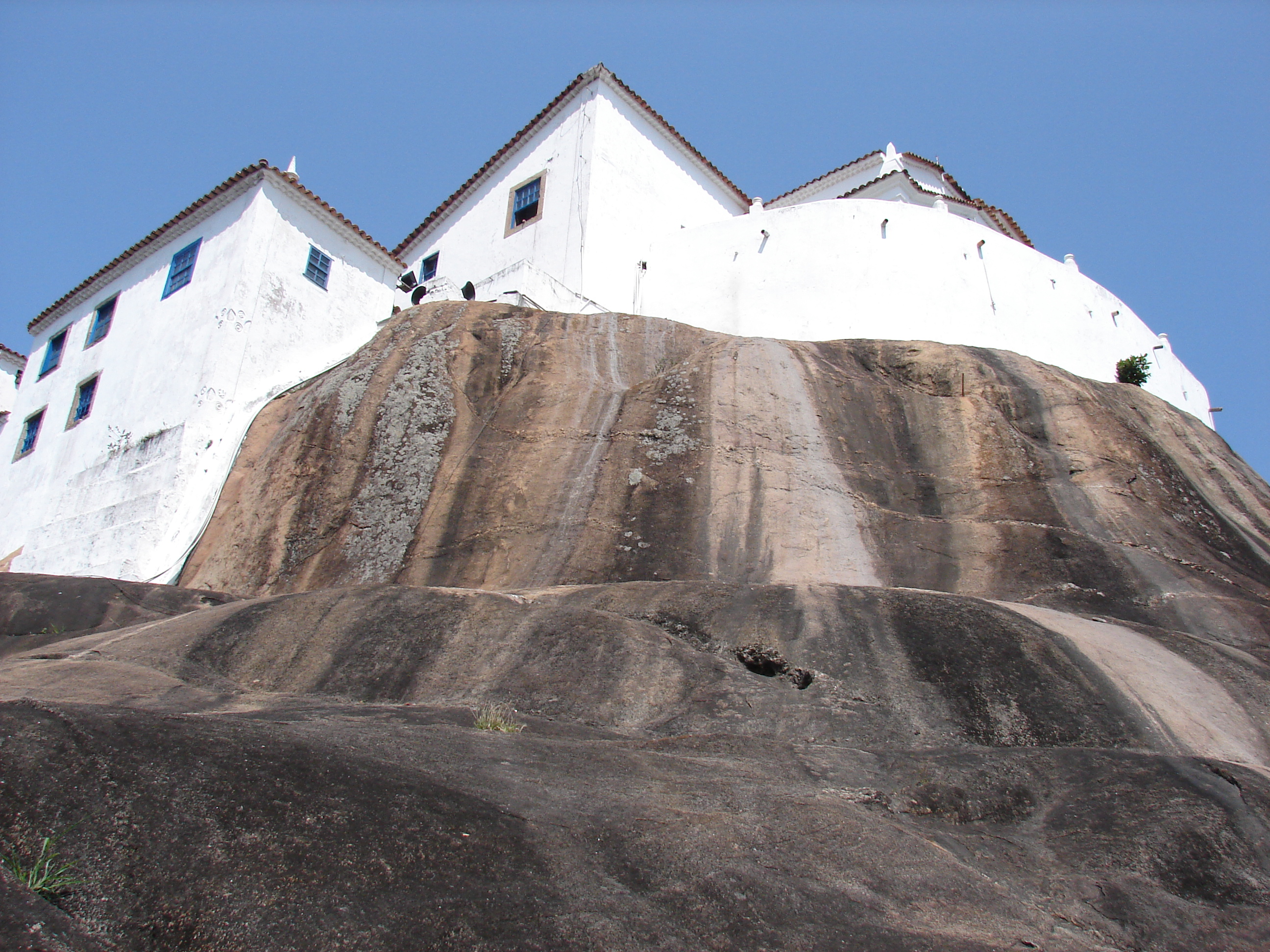 Convento da Penha / Vila Velha-ES, Brazil